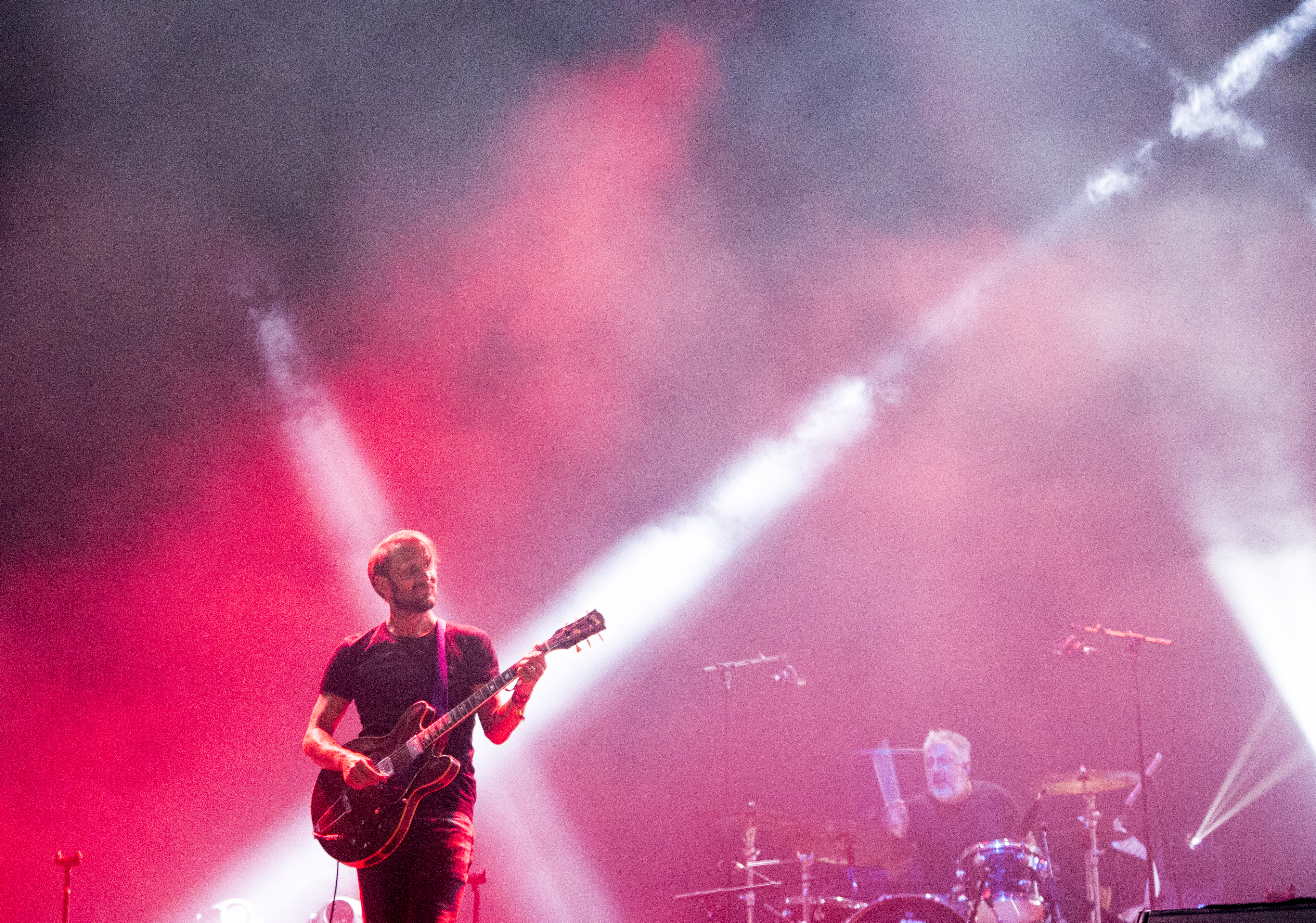 FIB 2015